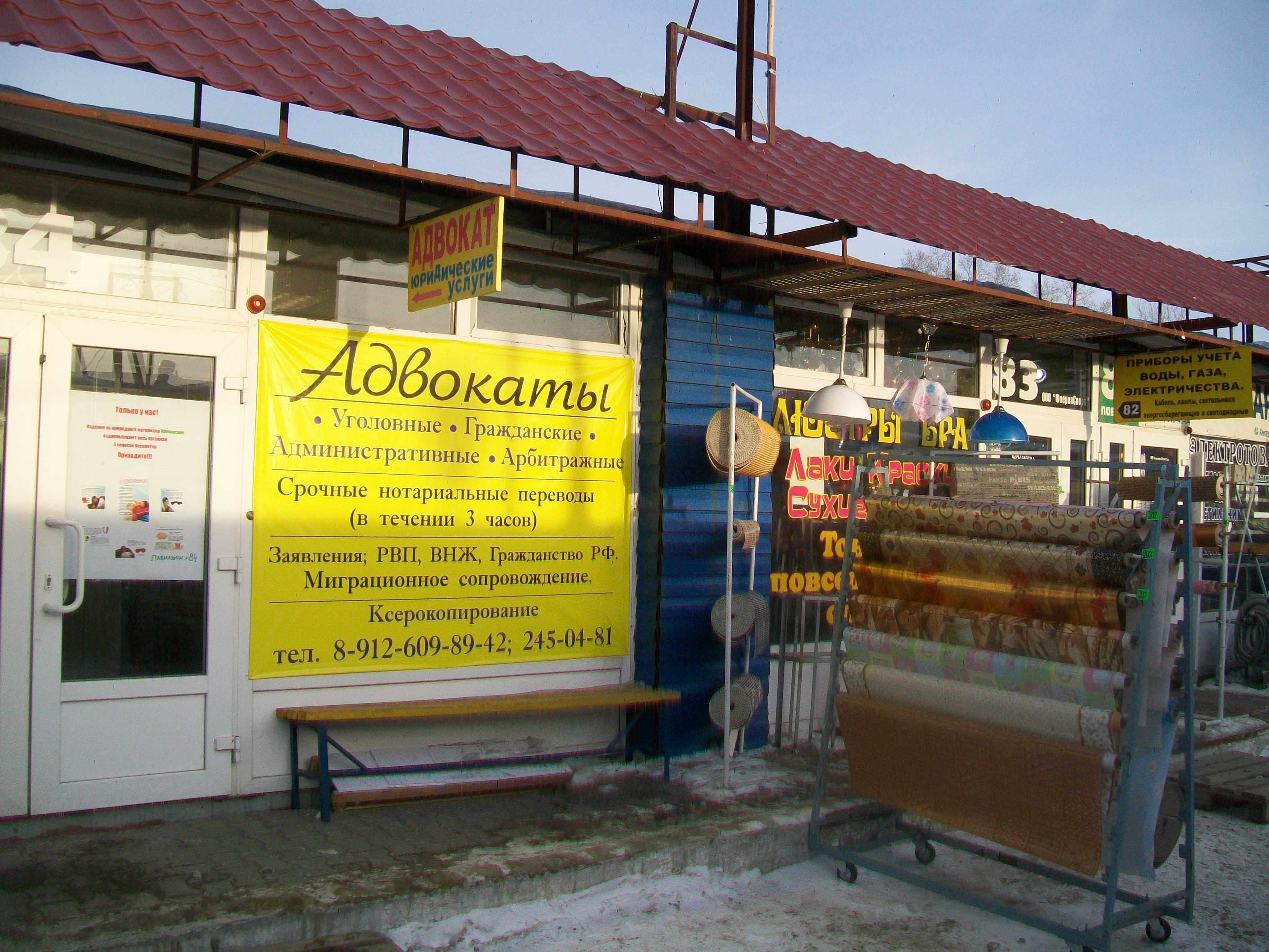 Адвокатская контора на одном из рынков Екатеринбурга